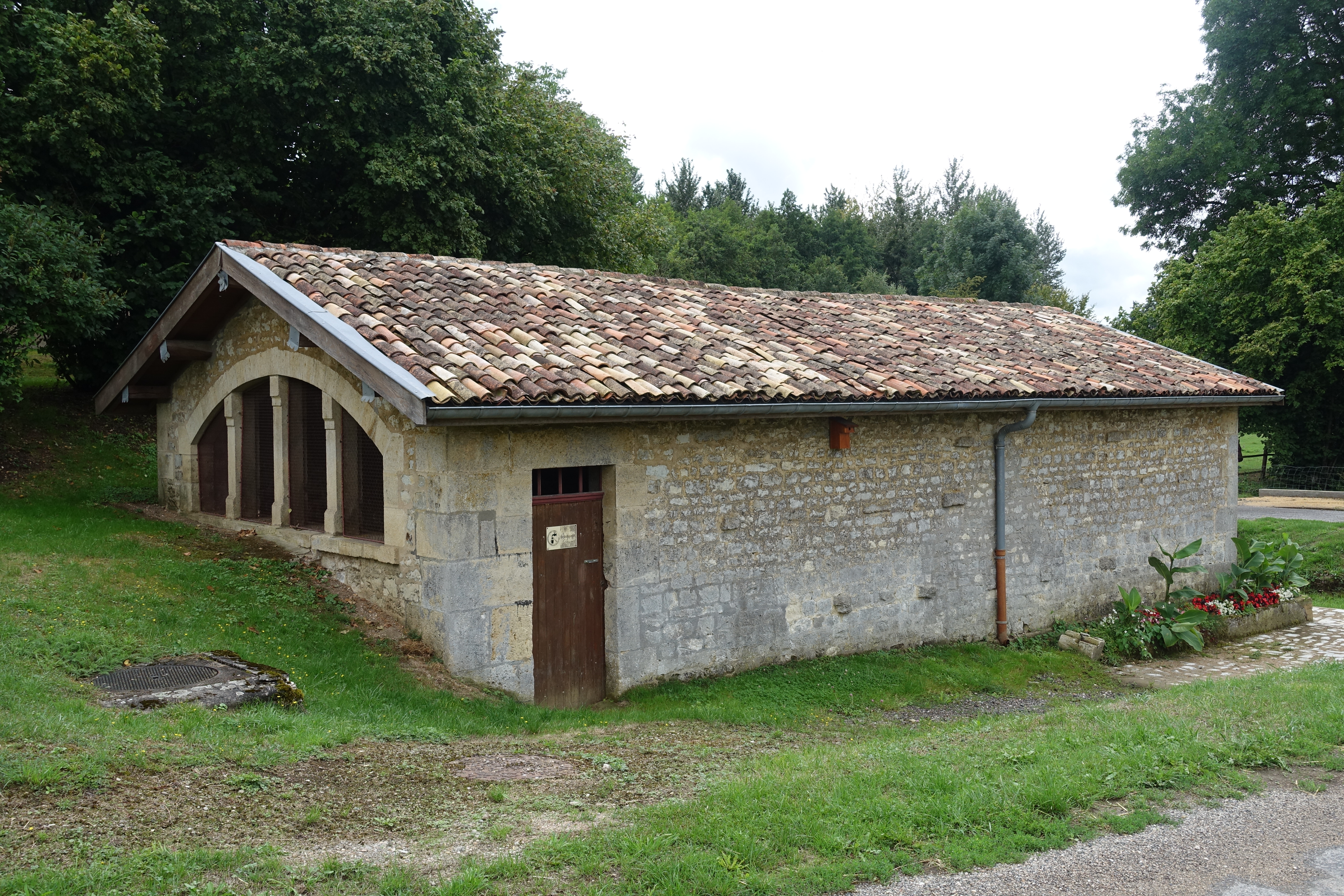 Lavoir à Auzéville-en-Argonne (Fr)